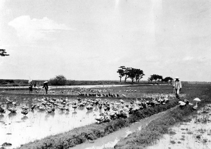 Repronegatief. Loopeenden op een sawah nabij Limbangan Wetan